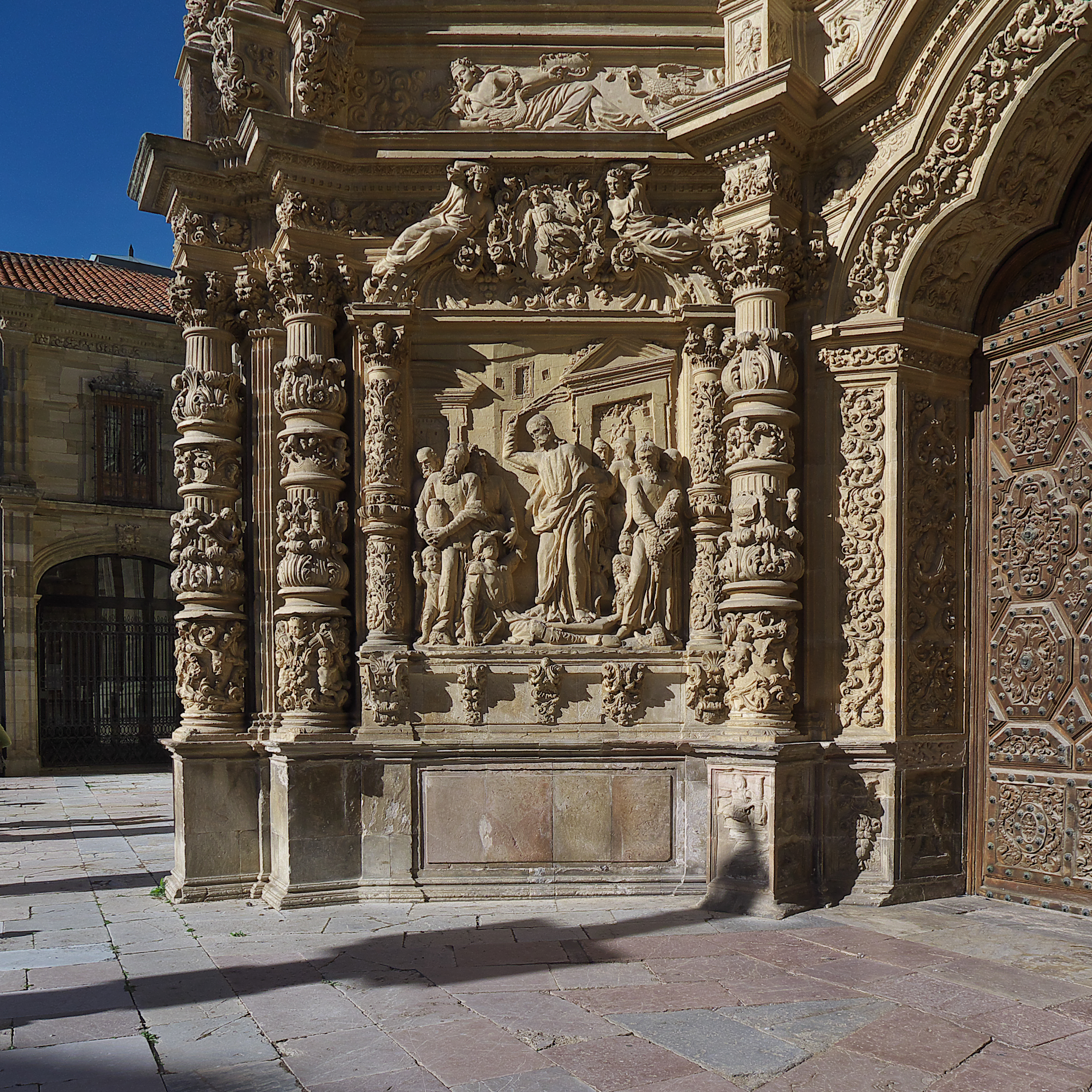 Portada principal de la catedral. Pablo Antonio Ruiz (1708)